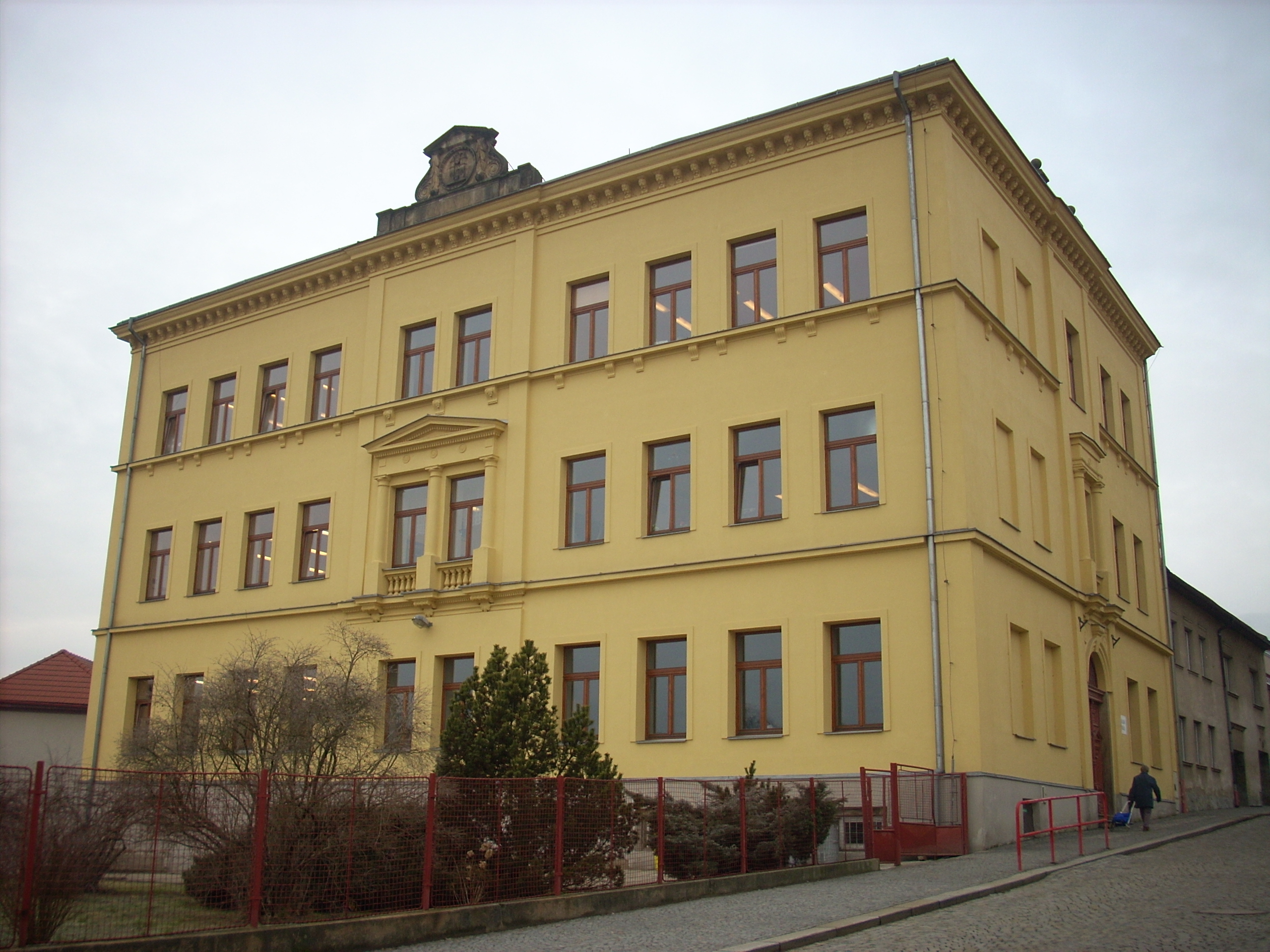 ZŠ Polná, Komenského